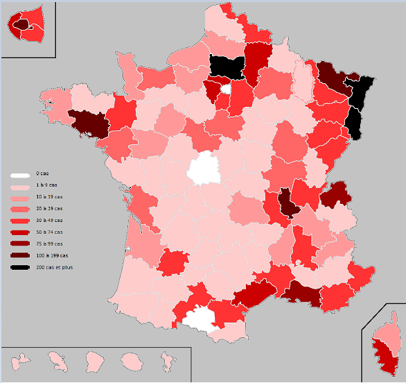 Cas de coronavirus dans chaque département français au 13 mars 2020